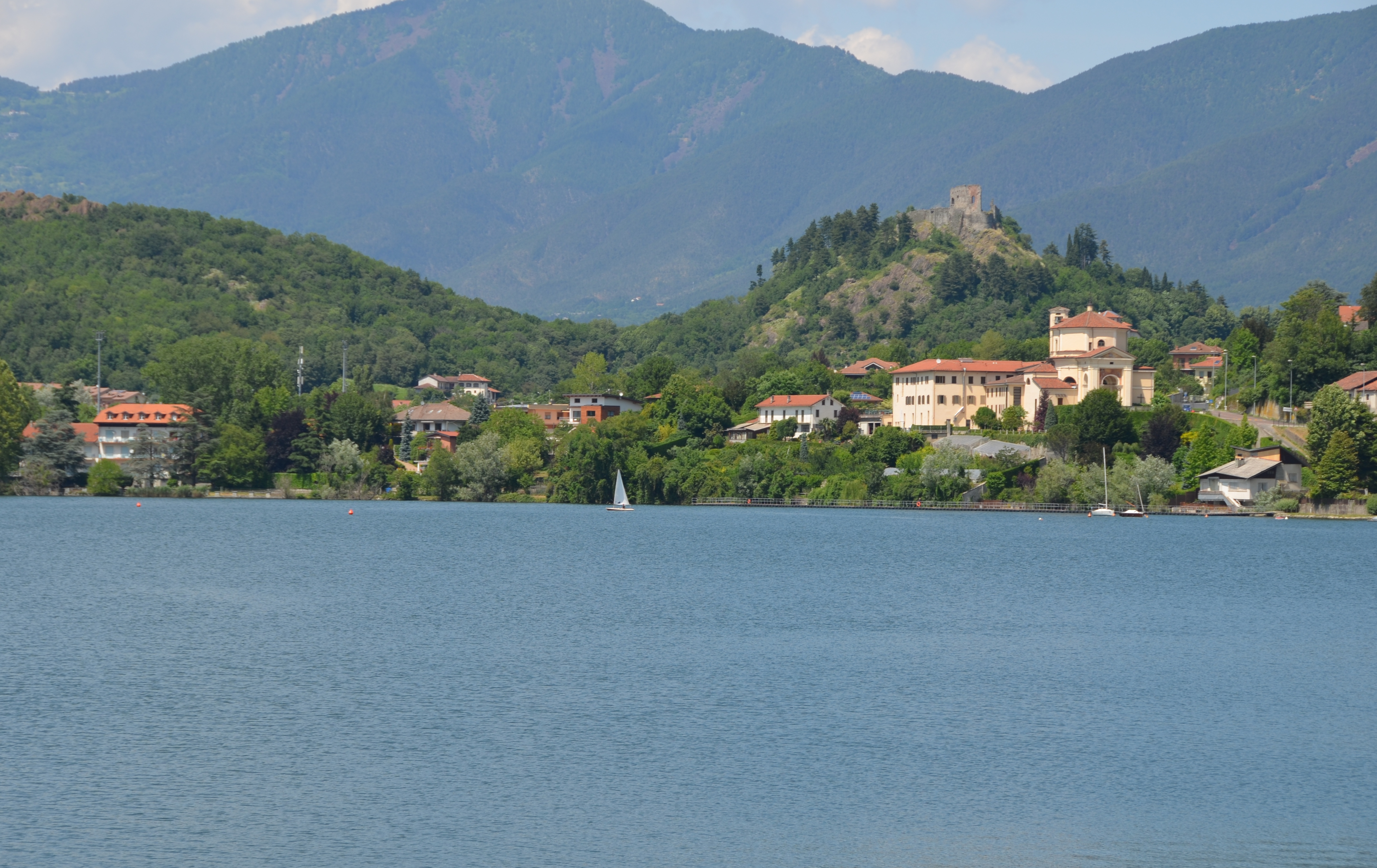 Llacs d'Avigliana